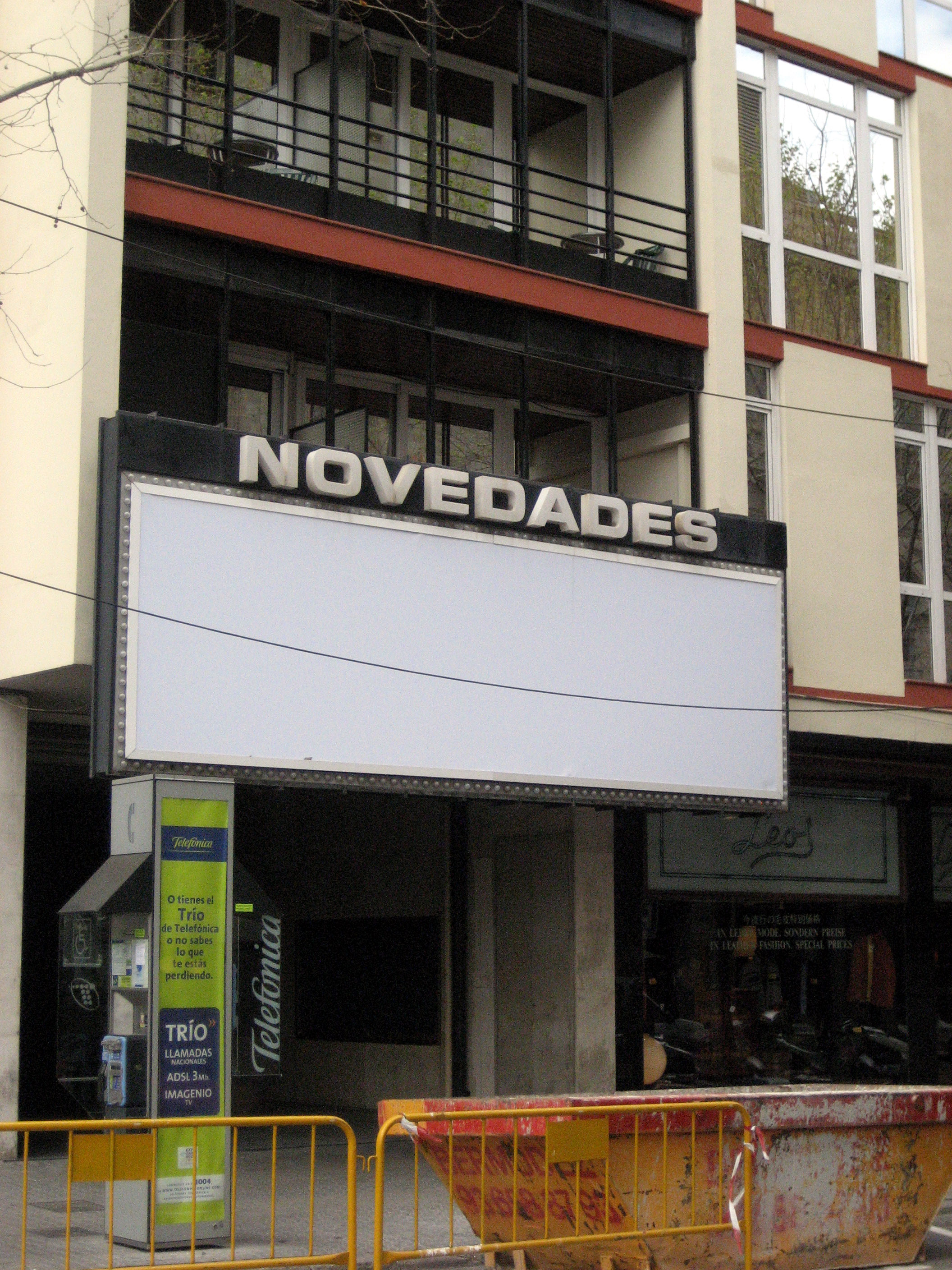 El Teatre Novetats (2007)